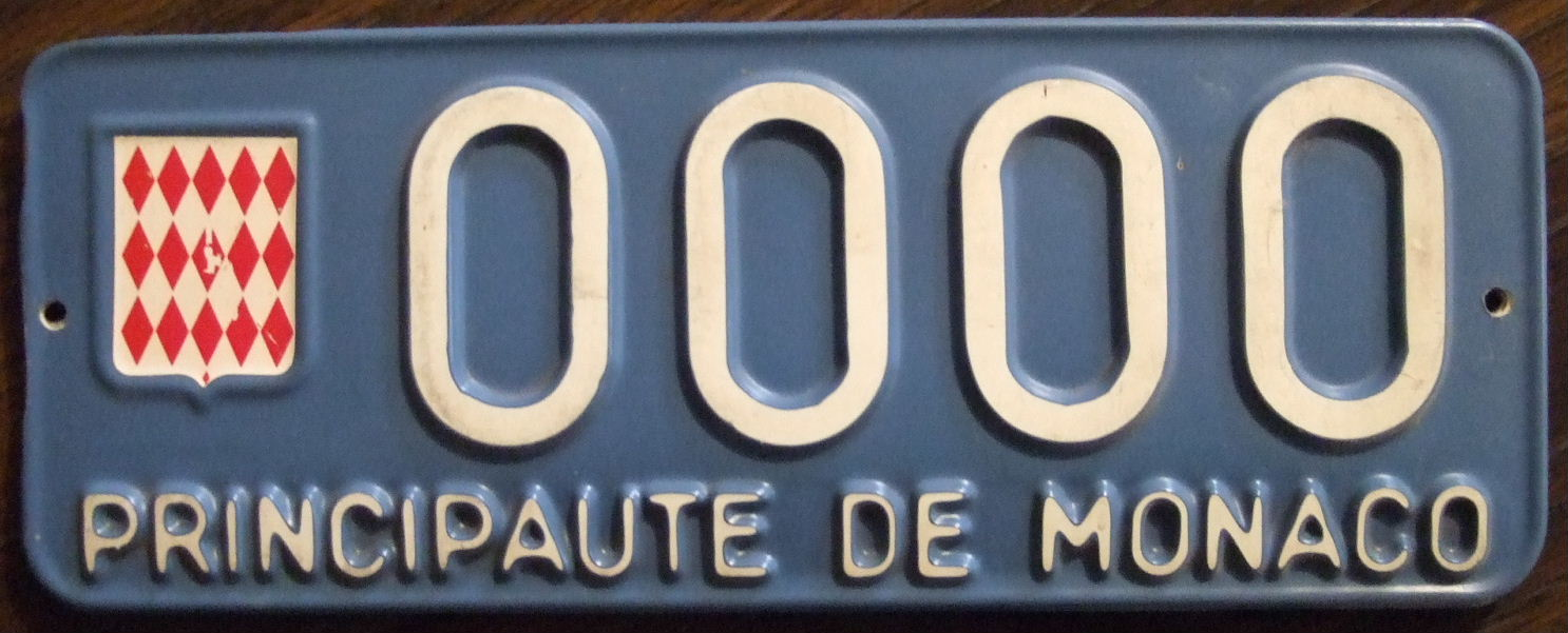 MONACO 1960's passenger sample